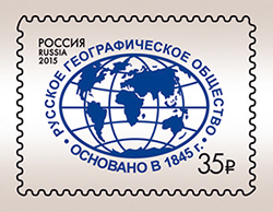 Русское географическое общество